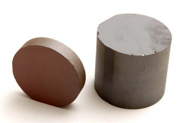 2” LEC GaP ingot produced by ITME (Instytut Technologii Materiałów Elektronicznych, Poland)